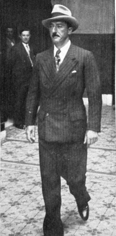 El dirigente argentino Carlos Noel.